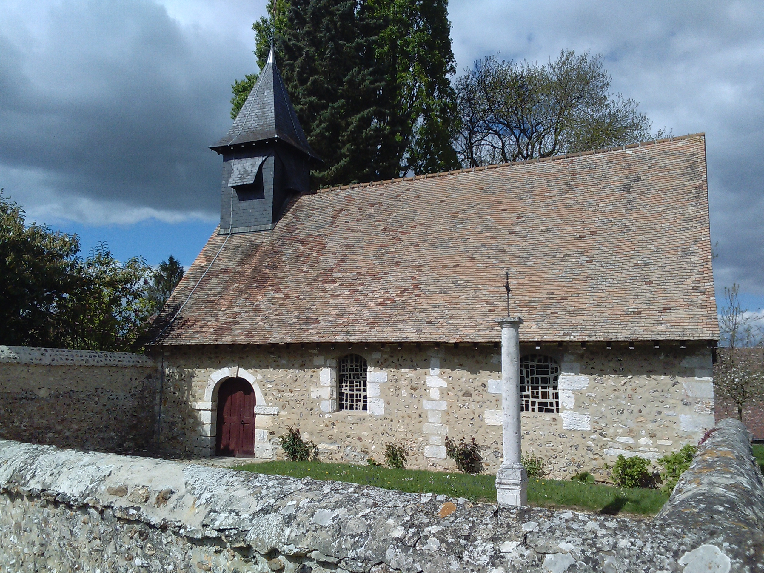 Église Saint-Denis de Vieux-Villez (27).